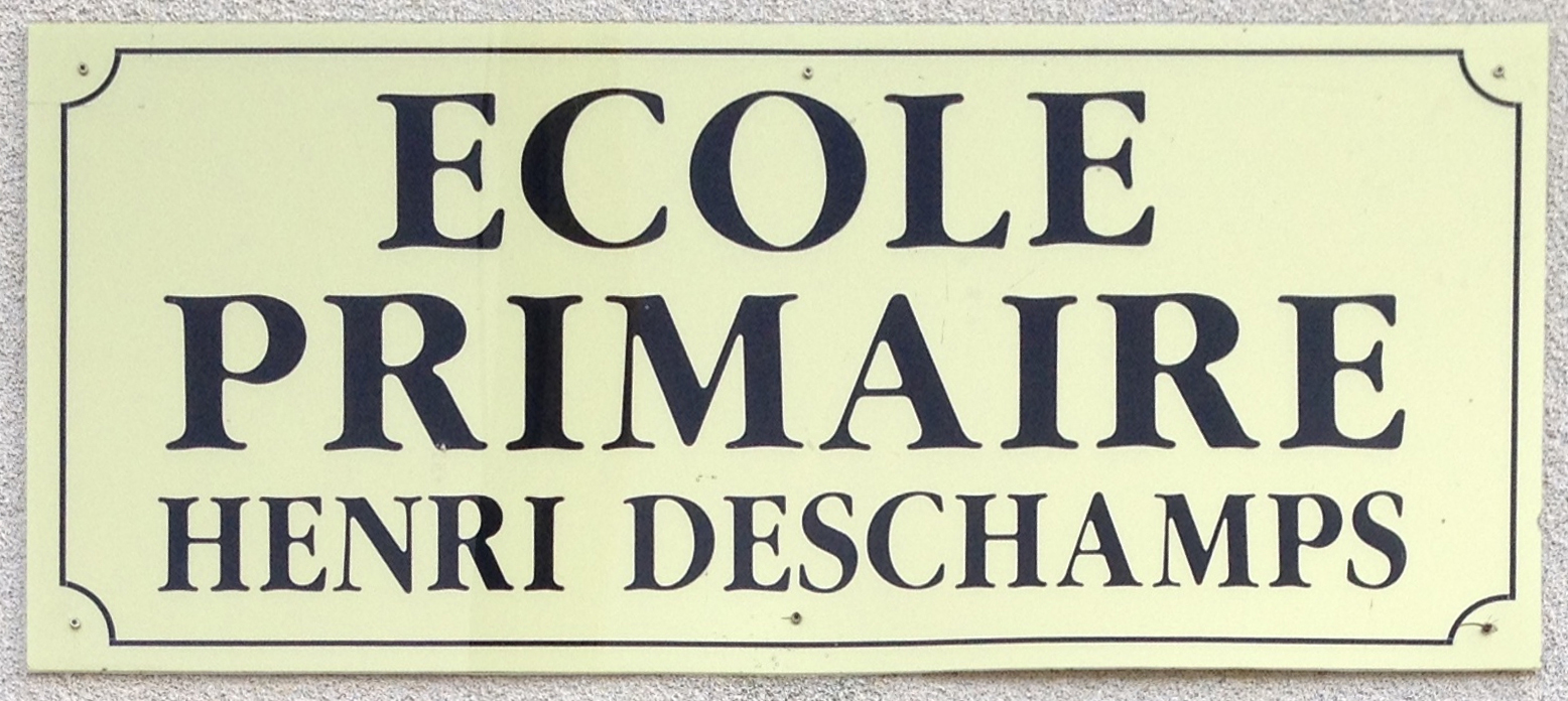 Plaques de l'école primaire Henri-Deschamps